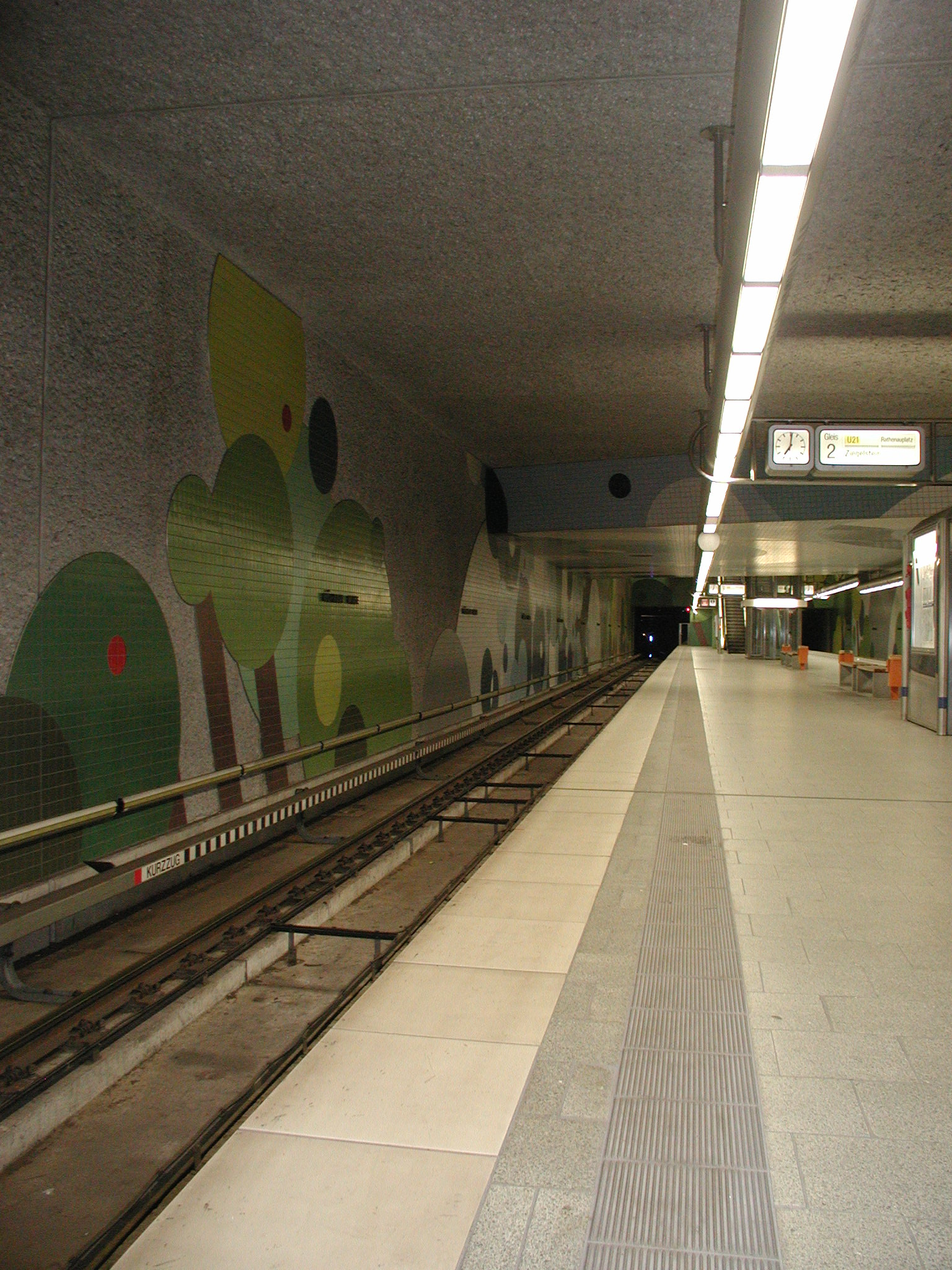 U-Bahnhof Nürnberg Wöhrder Wiese